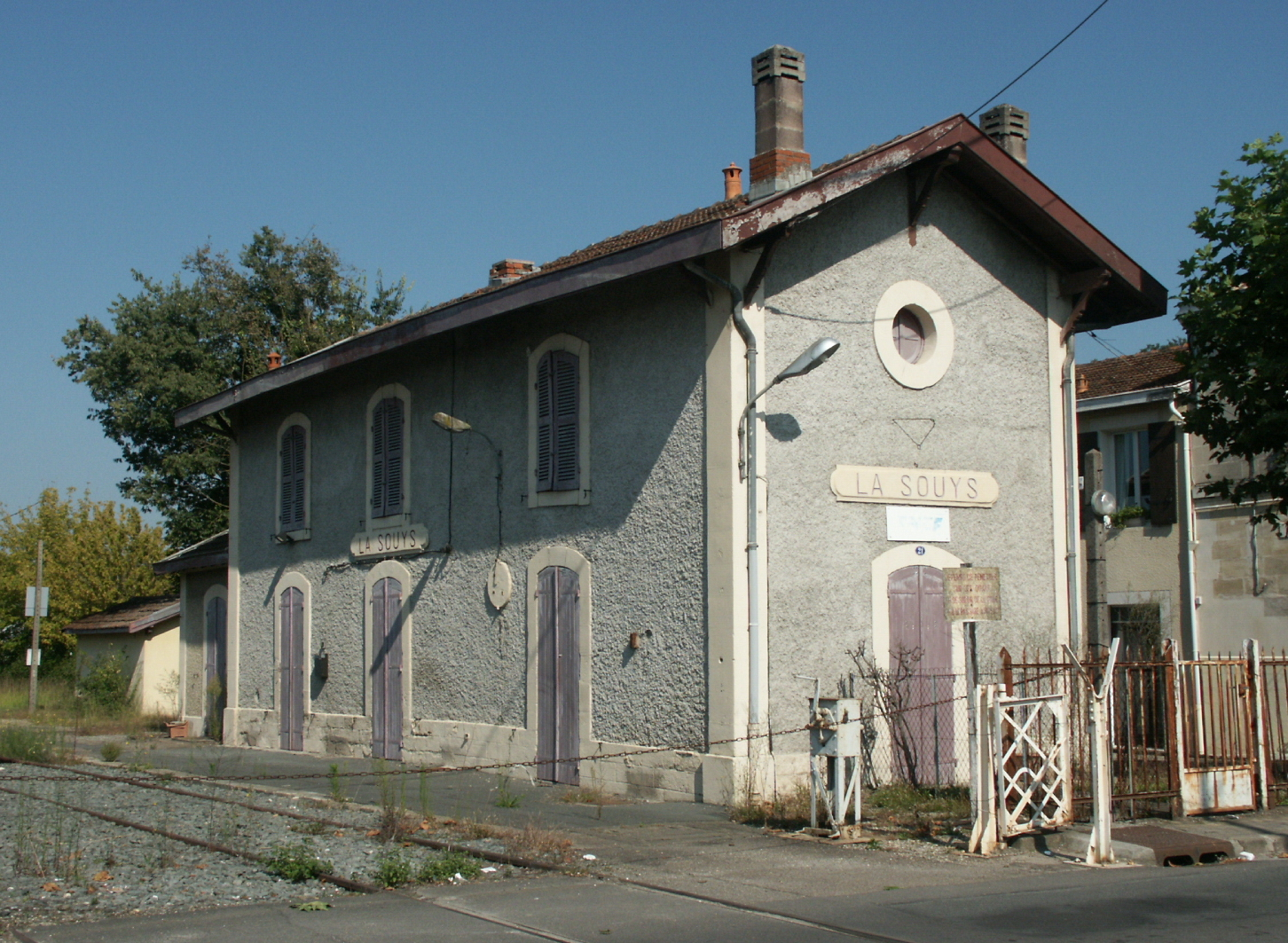 La gare de la Souys à Floirac (Gironde, France)